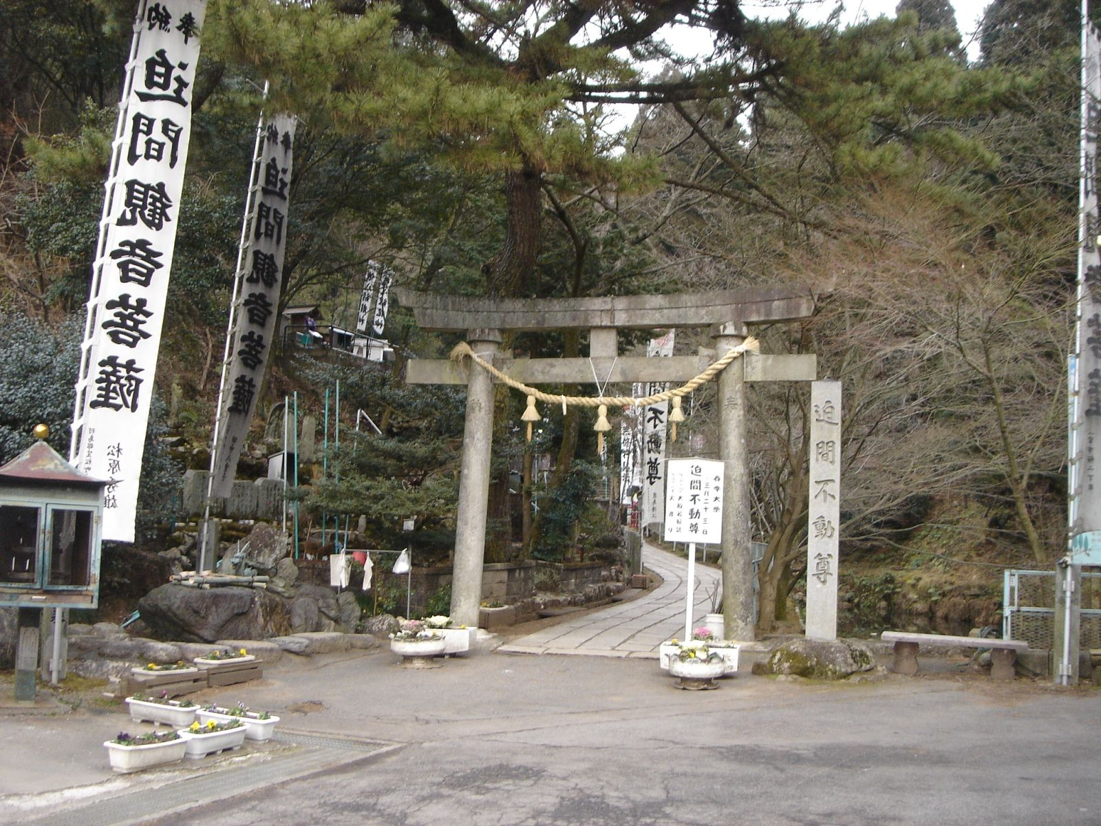 (迫間不動),Seki,Gifu,Japan(岐阜県関市)で撮影。